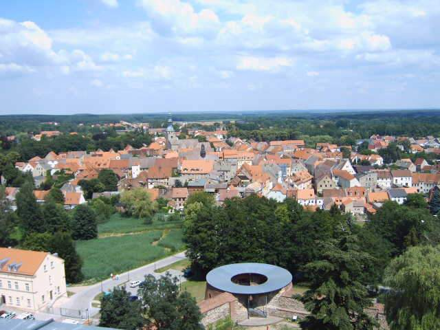 Belzig, Land Brandenburg, Deutschland, Blick von der Burg Eisenhardt Bild aufgenommen am 1.7.2006 von Olaf Meister